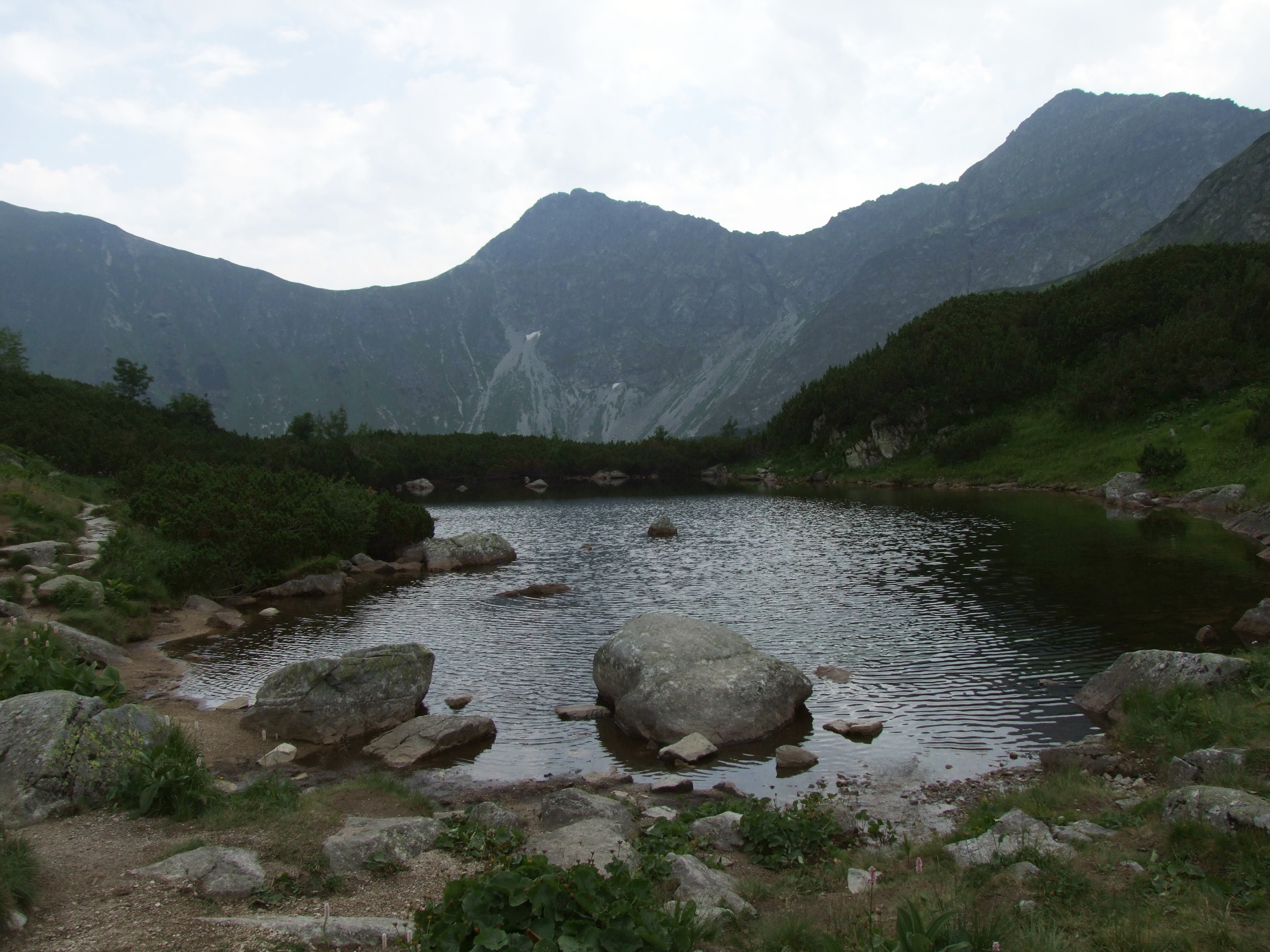 Pośrednie Rohackie Stawy (West Tatra Mountains)